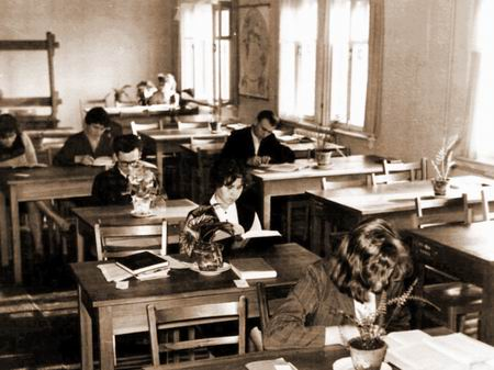 "Czytelnia Naukowa" in Bemowo Library.